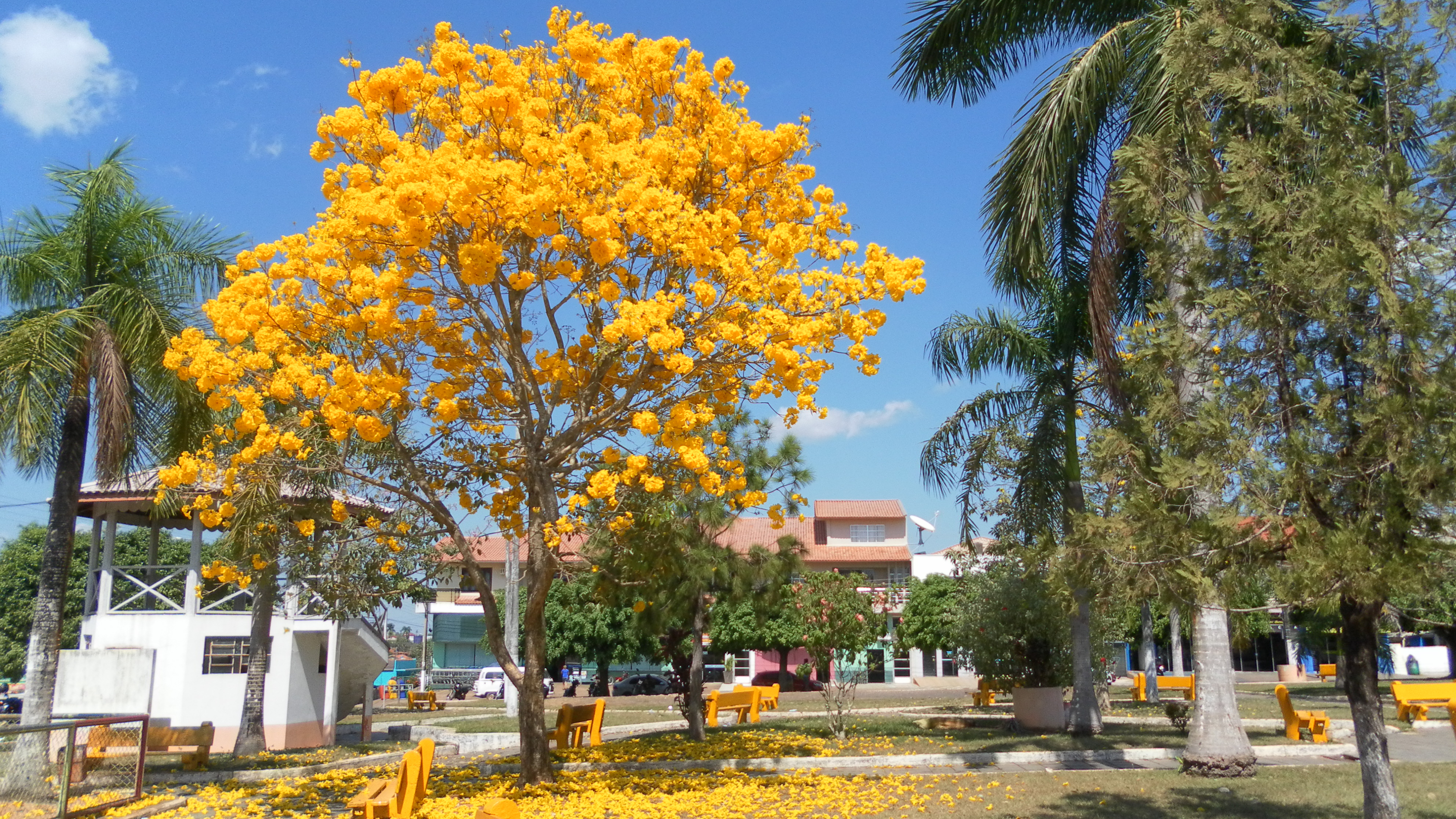 Ipê florido na Praça Municipal de Espigão do Oeste, em Rondônia.